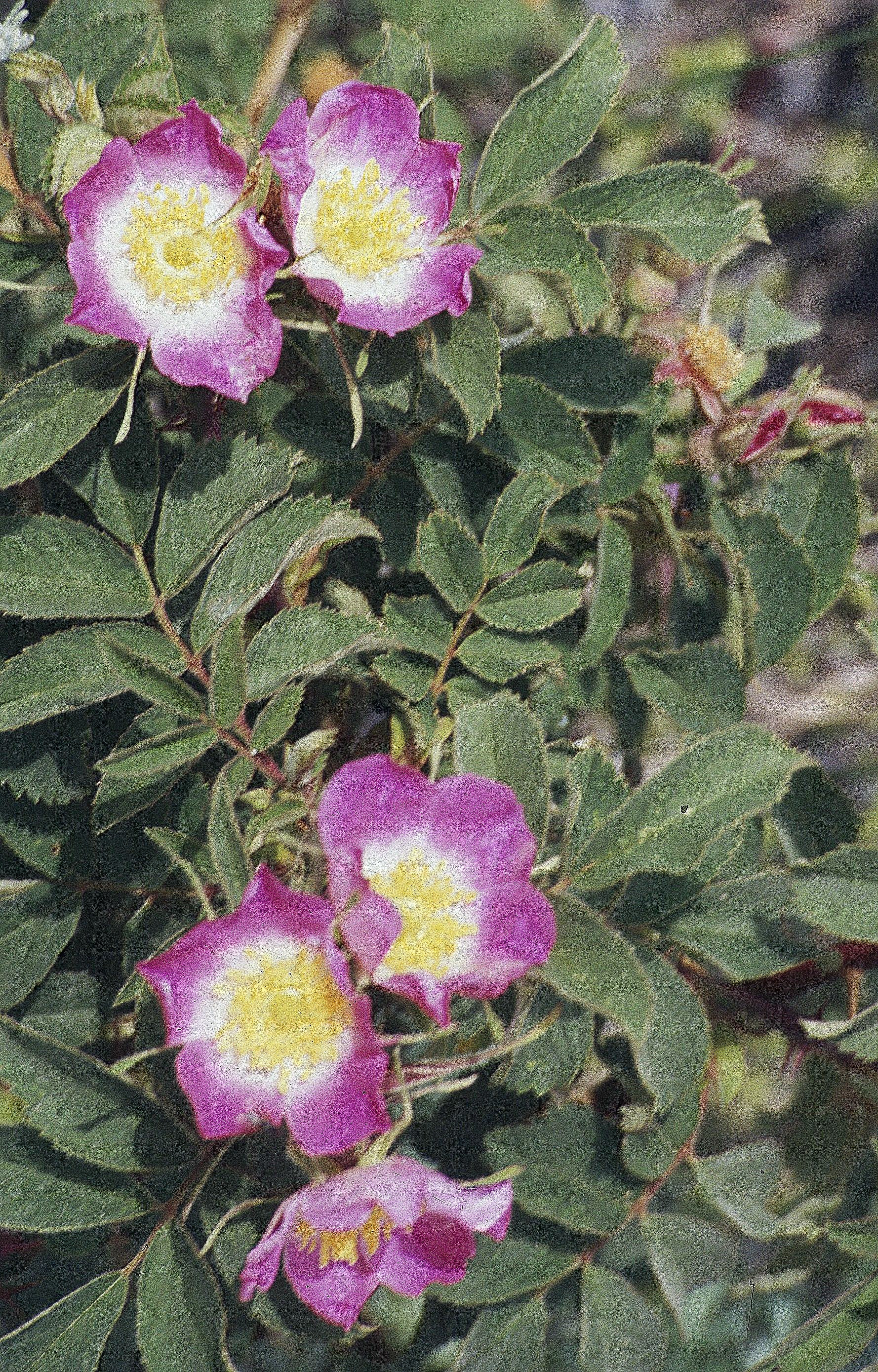 Rosa pendulina